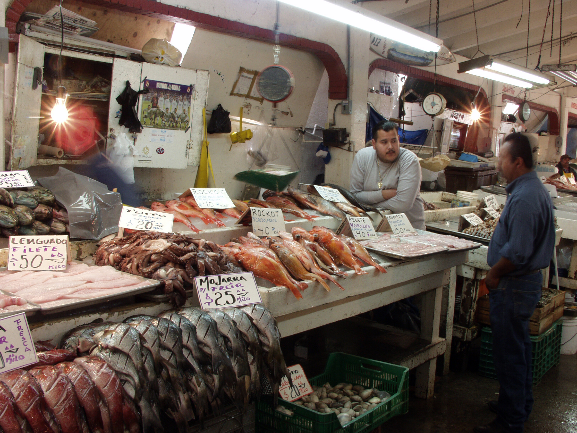 Mercado de Mariscos en Ensenada, Baja California